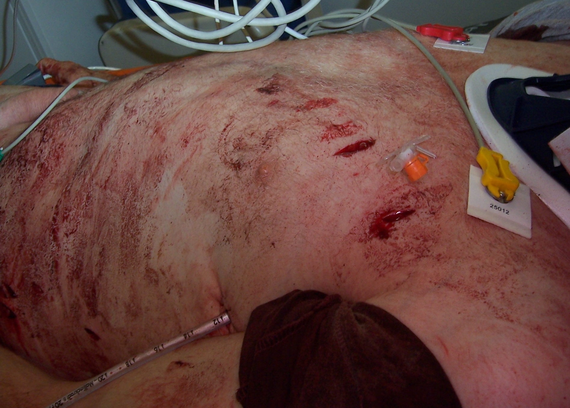 Patient mit thorakalen Messerstichwunden links. Ein Spannungspneumothorax wurde mit einer Notfallpunktion nach Monaldie entlastet, eine Thoraxdrainage nach Bülau ist eingelegt.